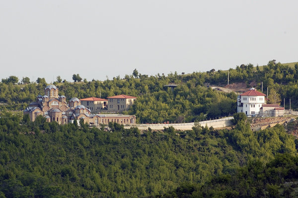 Манастирът „Свети Рафаил, Николай и Ирина“ край село Крива (Гривас), Гумендженско, Гърция.